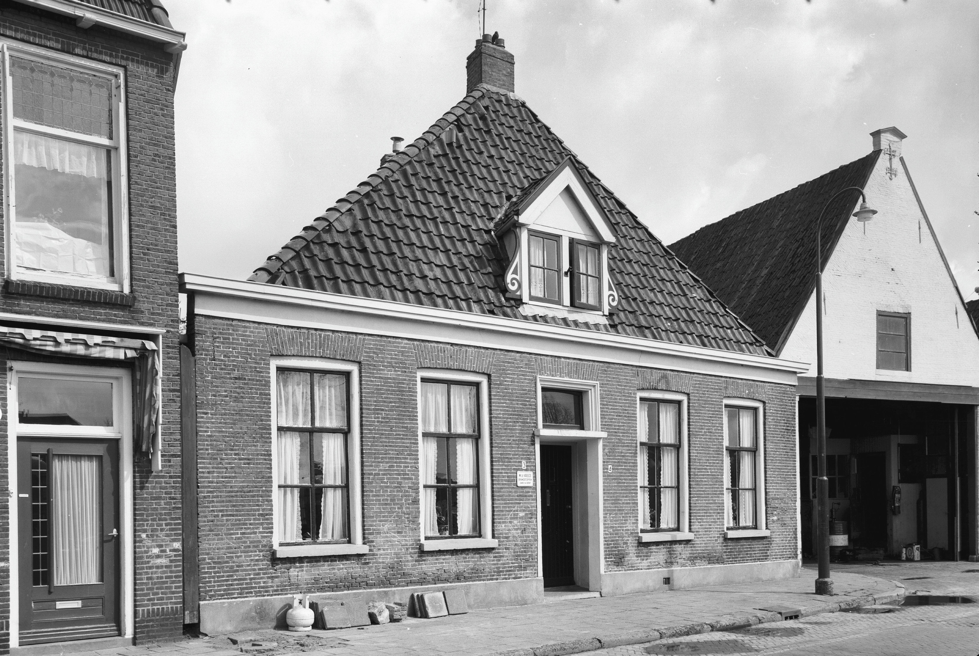 voorgevels